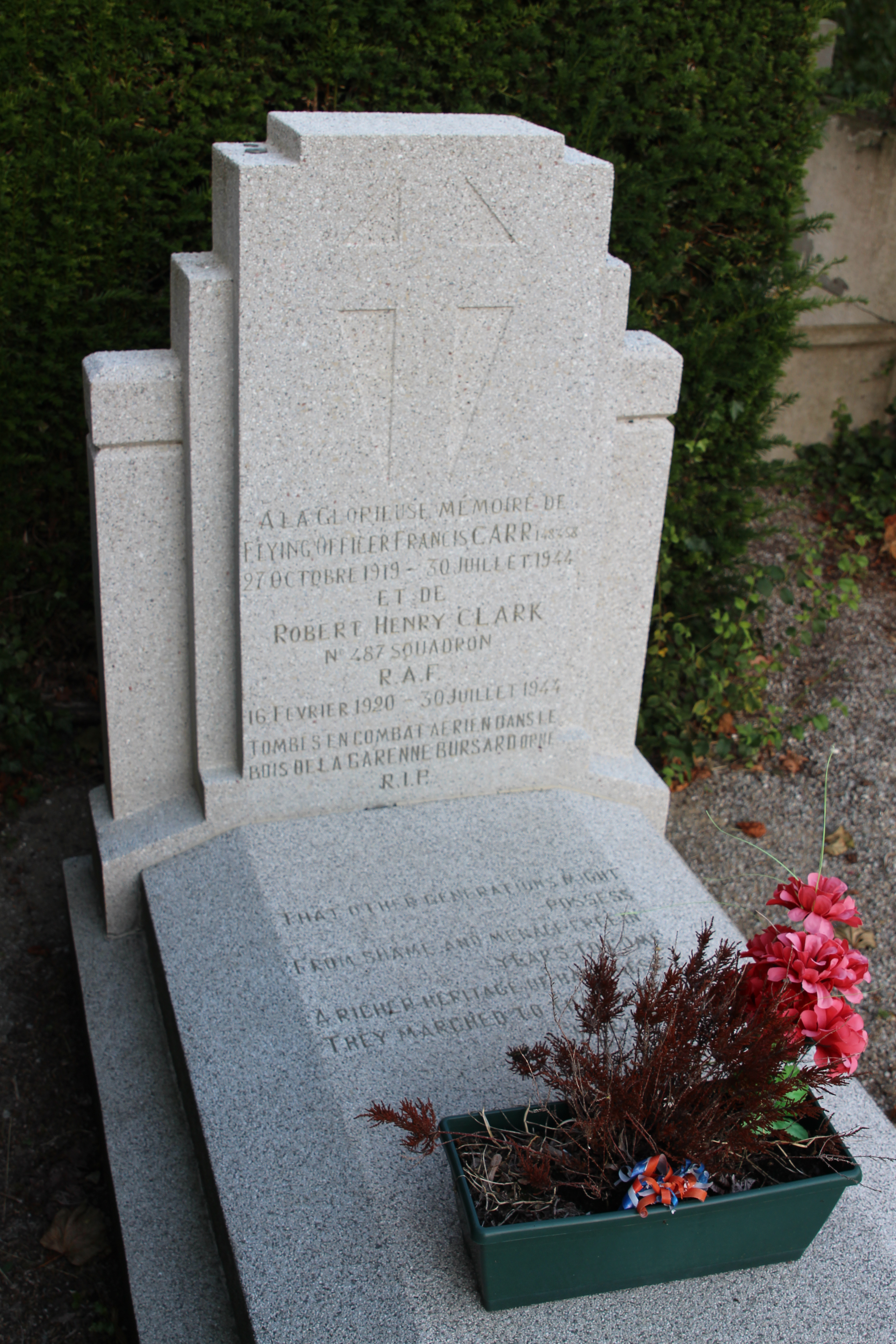 Bursard, Orne